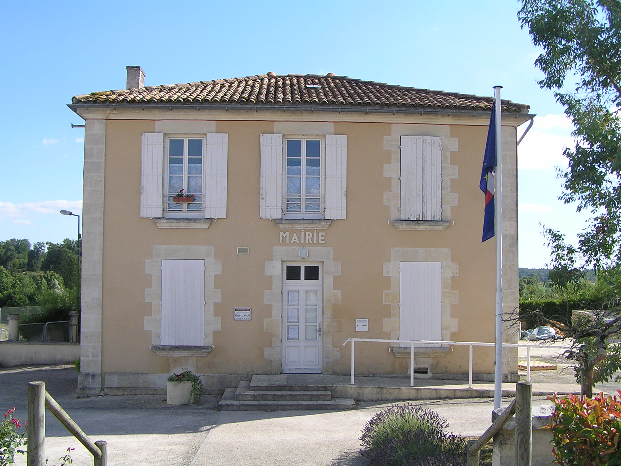 mairie de Chantillac